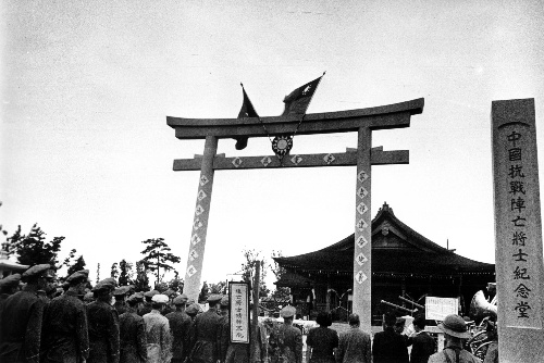 1946年国民政府还都南京后，将日军修建的日本神社改为“中国抗战阵亡将士纪念堂”